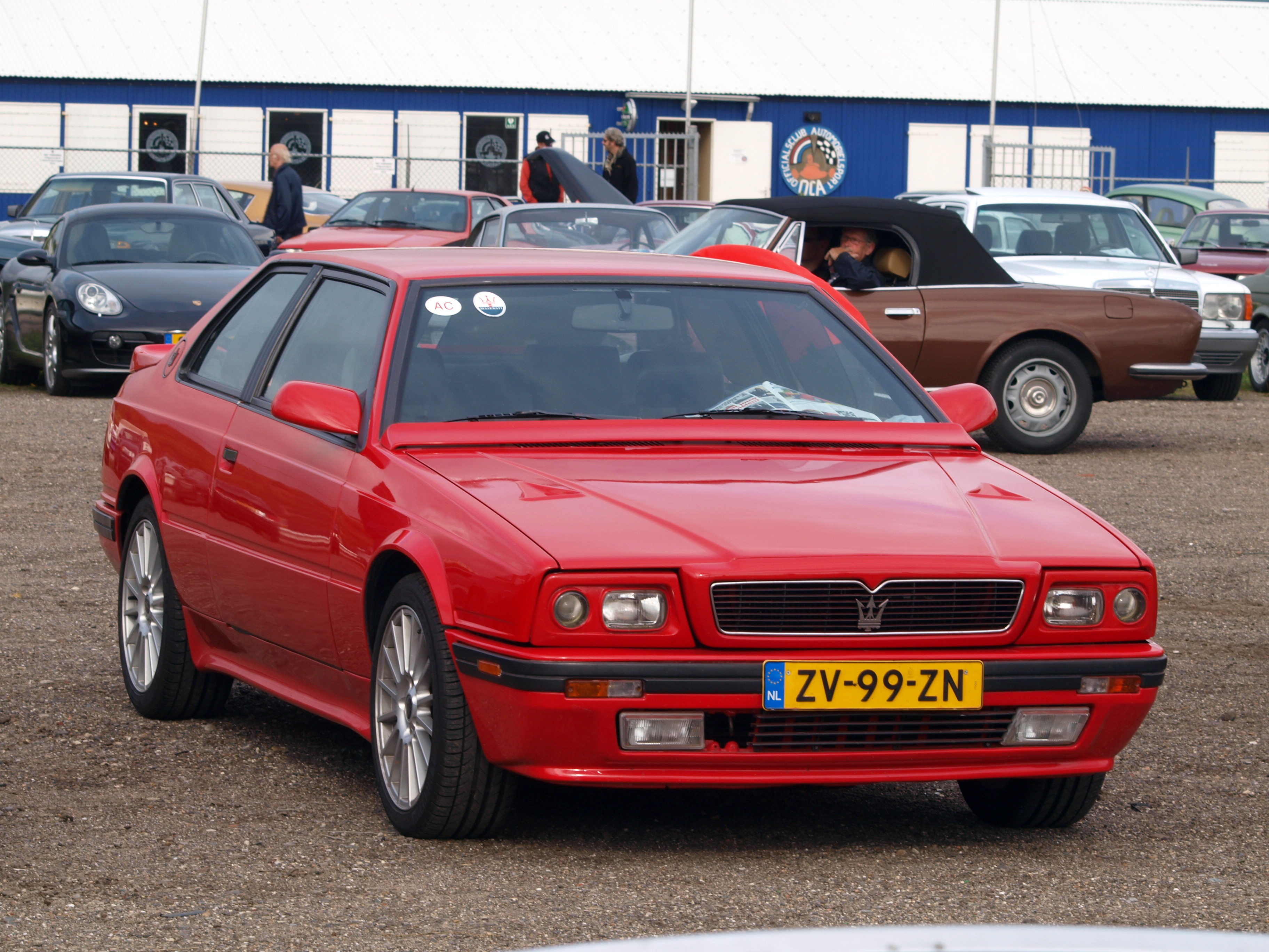 Nationaal Oldtimer Festival Zandvoort 2011.